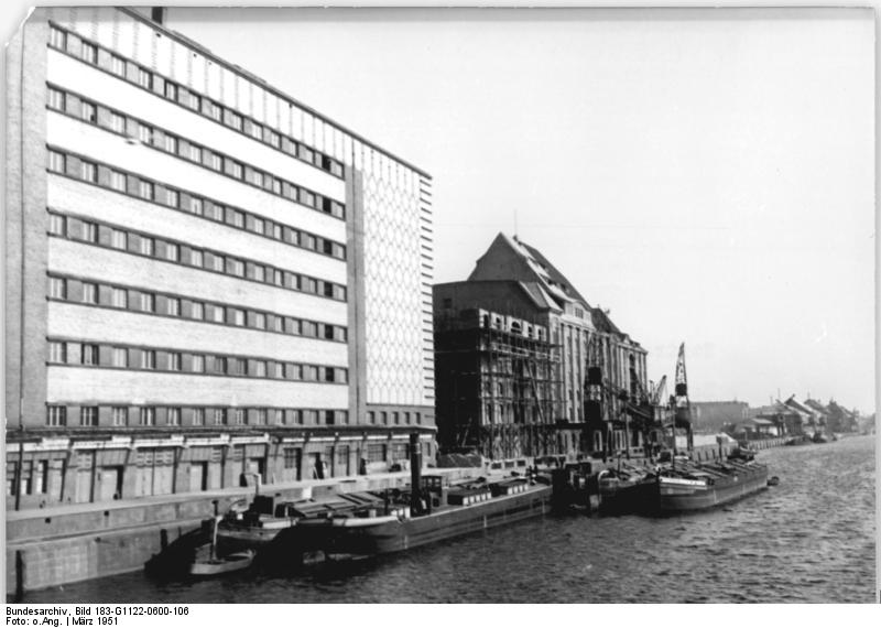 Zentralbild Berlin im März 1951 Blick von der Oberbaumbrücke auf den Osthafen mit dem Kühlhaus links.